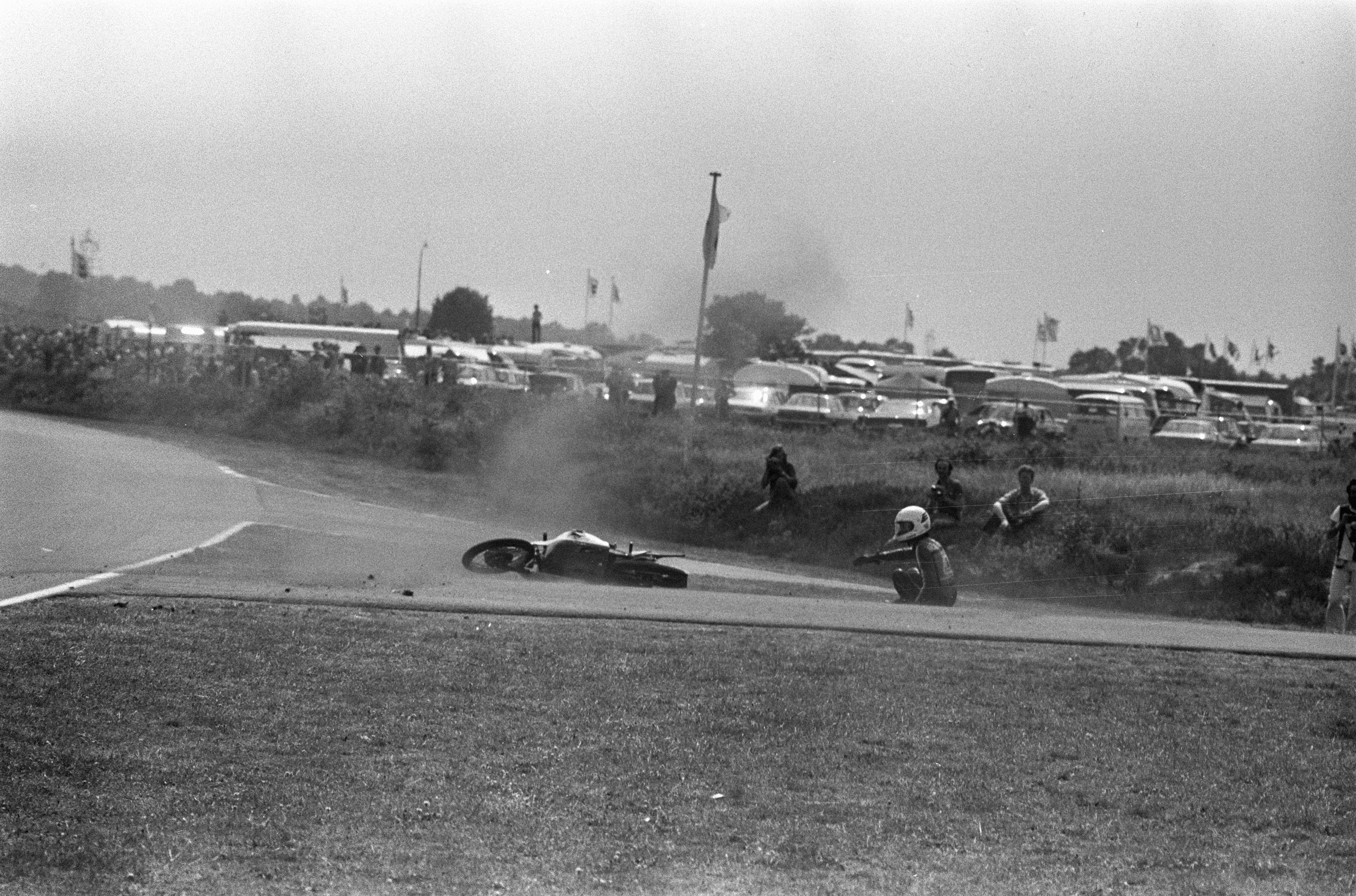 Collectie / Archief : Fotocollectie Anefo Reportage / Serie : TT Assen 1973 Beschrijving : Otello Buscherini gevallen in 125cc-race Datum : 23 juni 1973 Locatie : Assen Trefwoorden : circuits, motorcoureurs, motorfietsen, motorsport, races Persoonsnaam : Buscherini, Otello Fotograaf : Verhoeff, Bert / Anefo Auteursrechthebbende : Nationaal Archief Materiaalsoort : Negatief (zwart/wit) Nummer archiefinventaris : bekijk toegang 2.24.01.05 Bestanddeelnummer : 926-5034